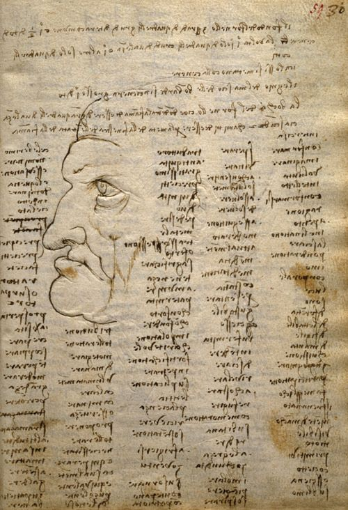 Pagina del Codice Trivulzio di Leonardo da Vinci, oggi al Castello Sforzesco di Milano. Codex Trivulzianus